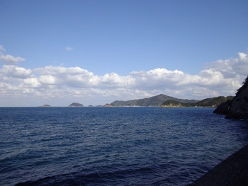 水の子島方面、鶴見碕